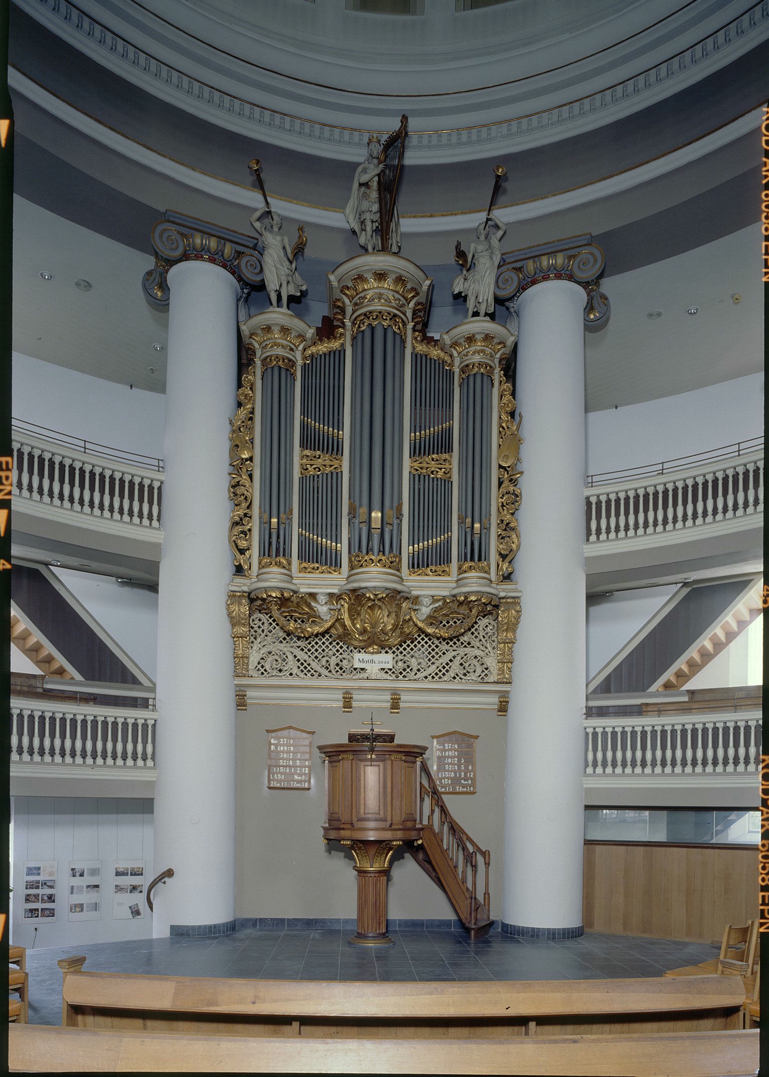 Gereformeerd Vrijgemaakte Koepelkerk: Interieur, aanzicht orgel, orgelnummer 101 (opmerking: Gefotografeerd voor Het Historische Orgel in Nederland 1840-1849)